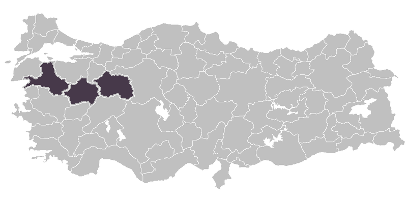 Türkiye'de bor çıkarılan iller: Balıkesir, Kütahya, EskişehirNot: Bu dosyadan yararlanılmıştır.